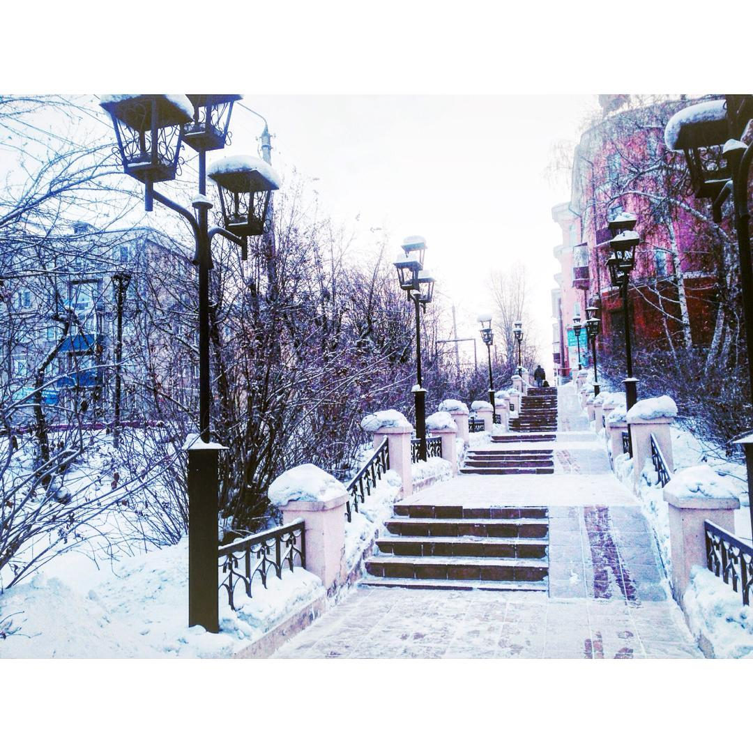 Черемхово ул. Некрасова